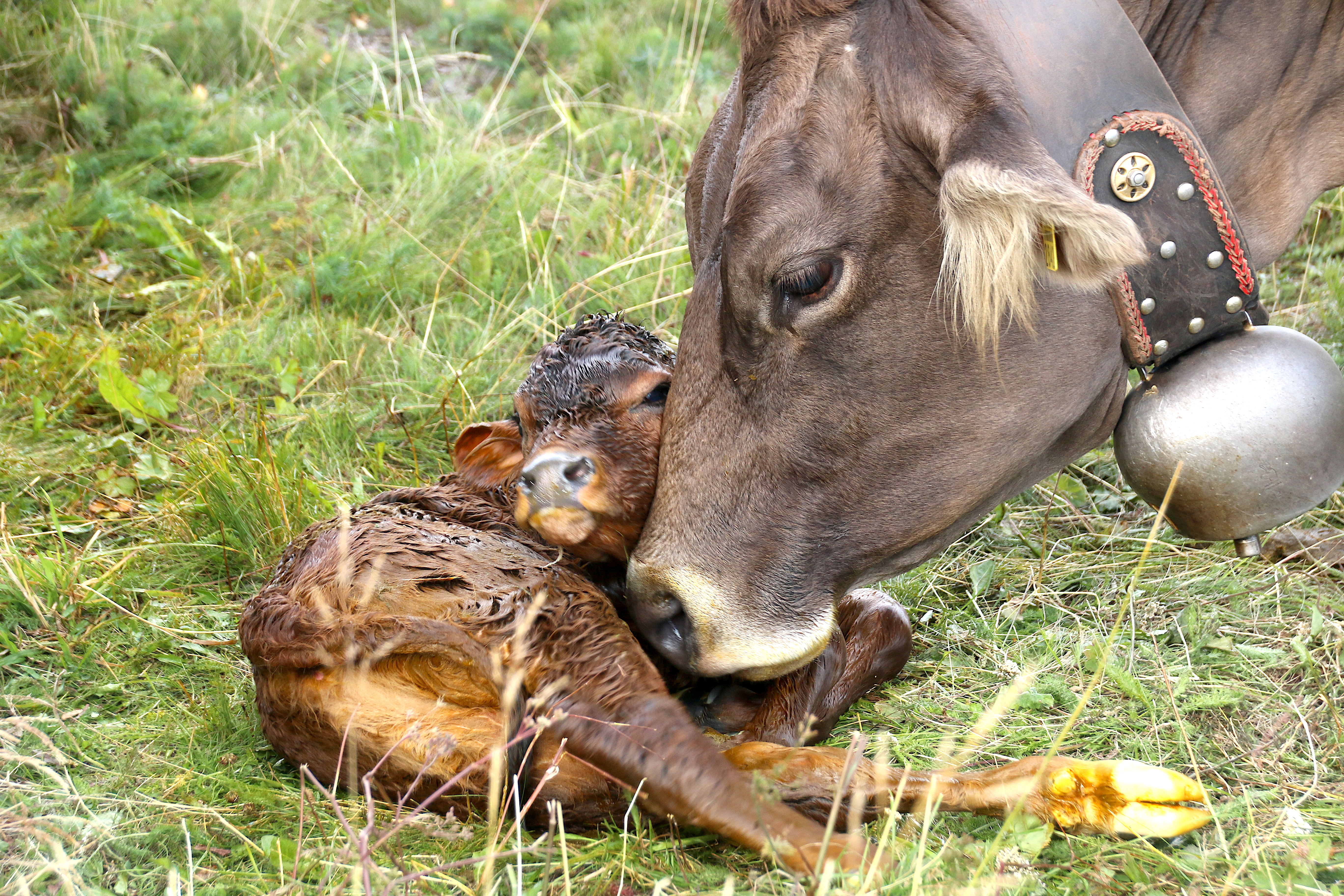 Kuh und Kalb Simplonpass